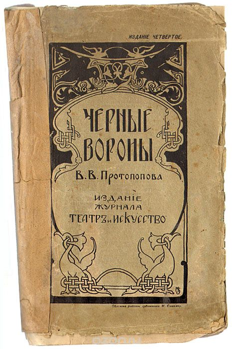 Черные вороны